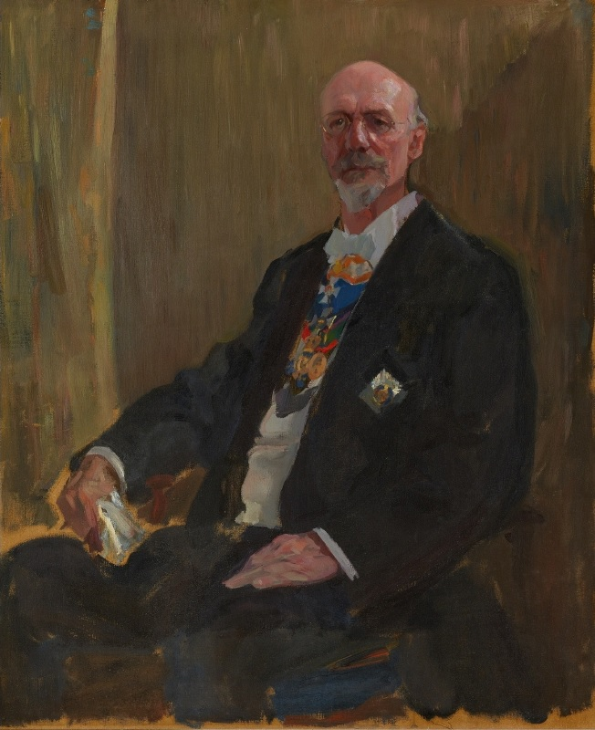 Max Jordan (1837–1906), Öl auf Leinwand, 110 × 92 cm, Ident.Nr. A II 599, Nationalgalerie der Staatlichen Museen zu Berlin - Preußischer Kulturbesitz